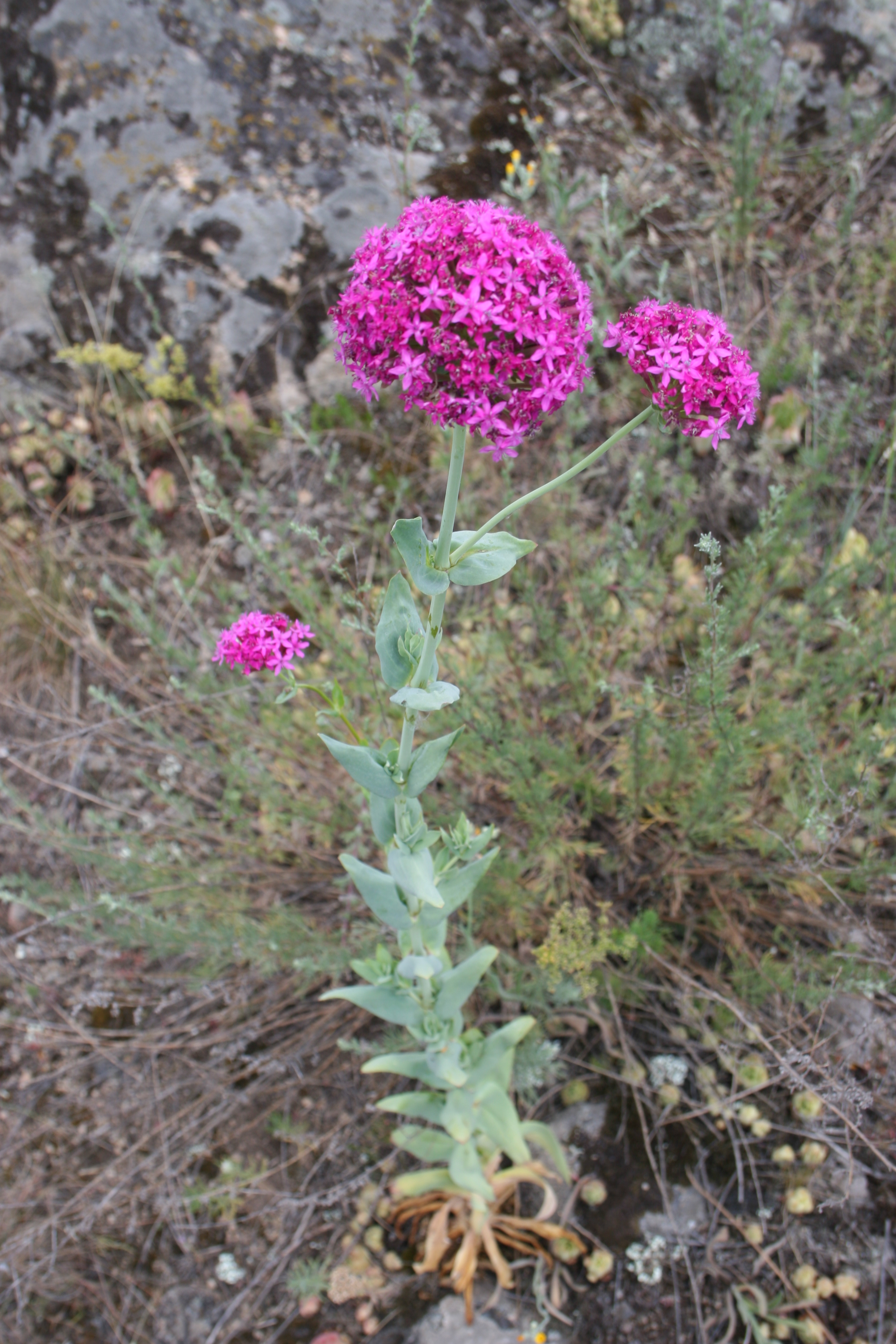 Canon EOS 20D